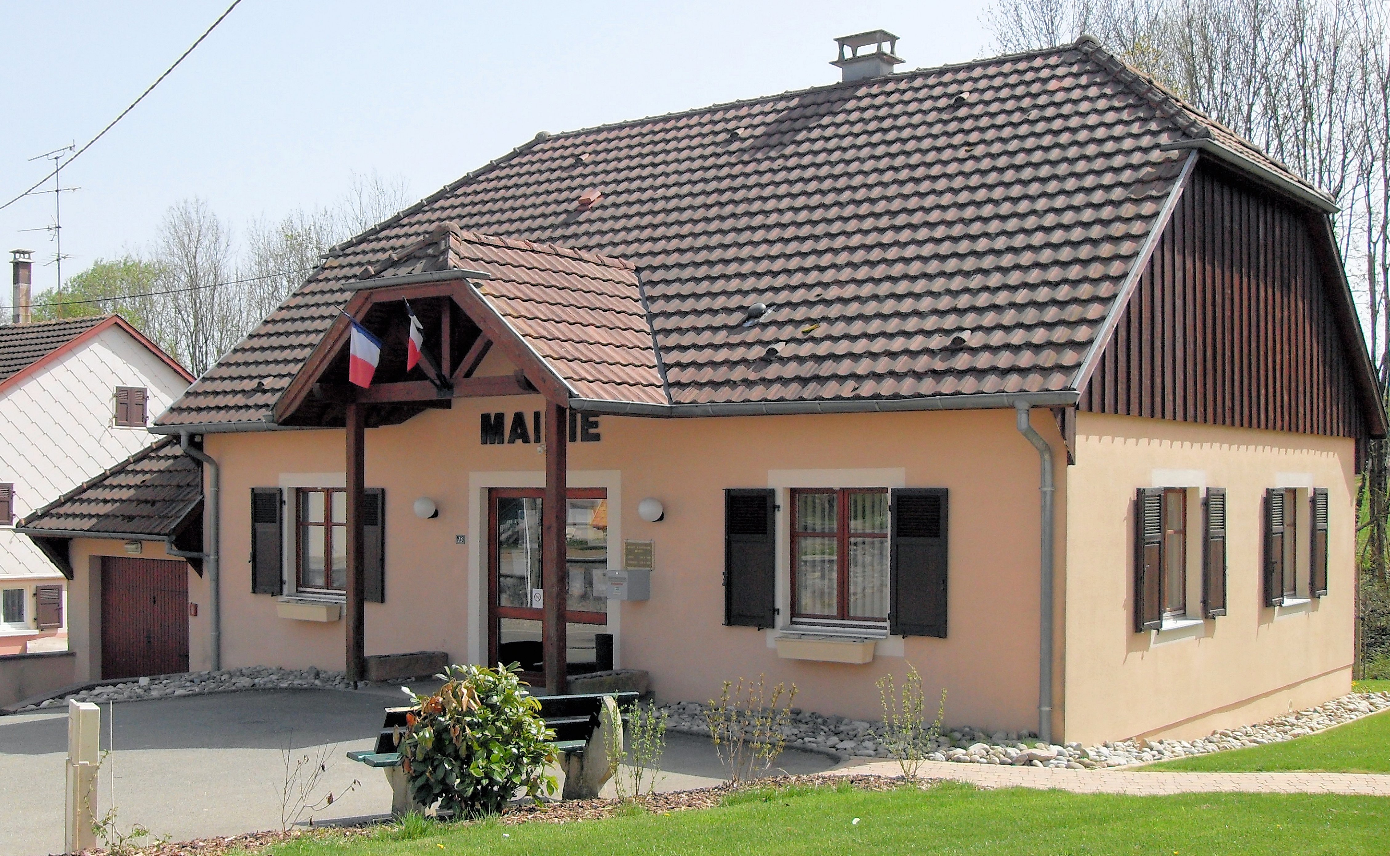 La mairie de Bellemagny